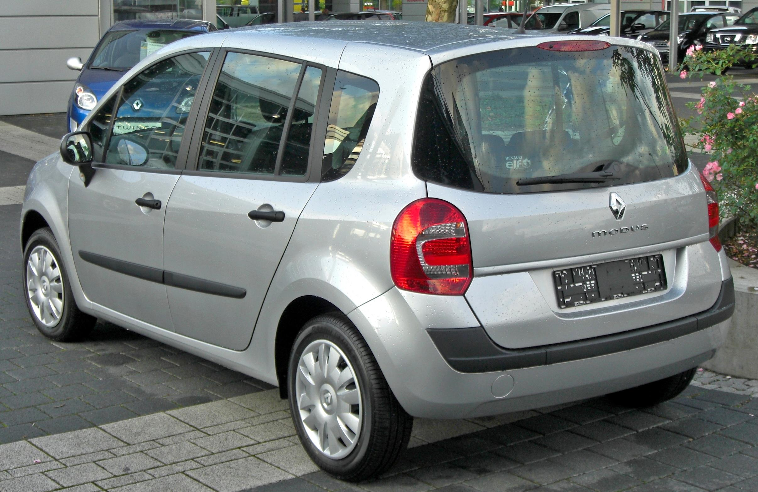 Renault Grand Modus